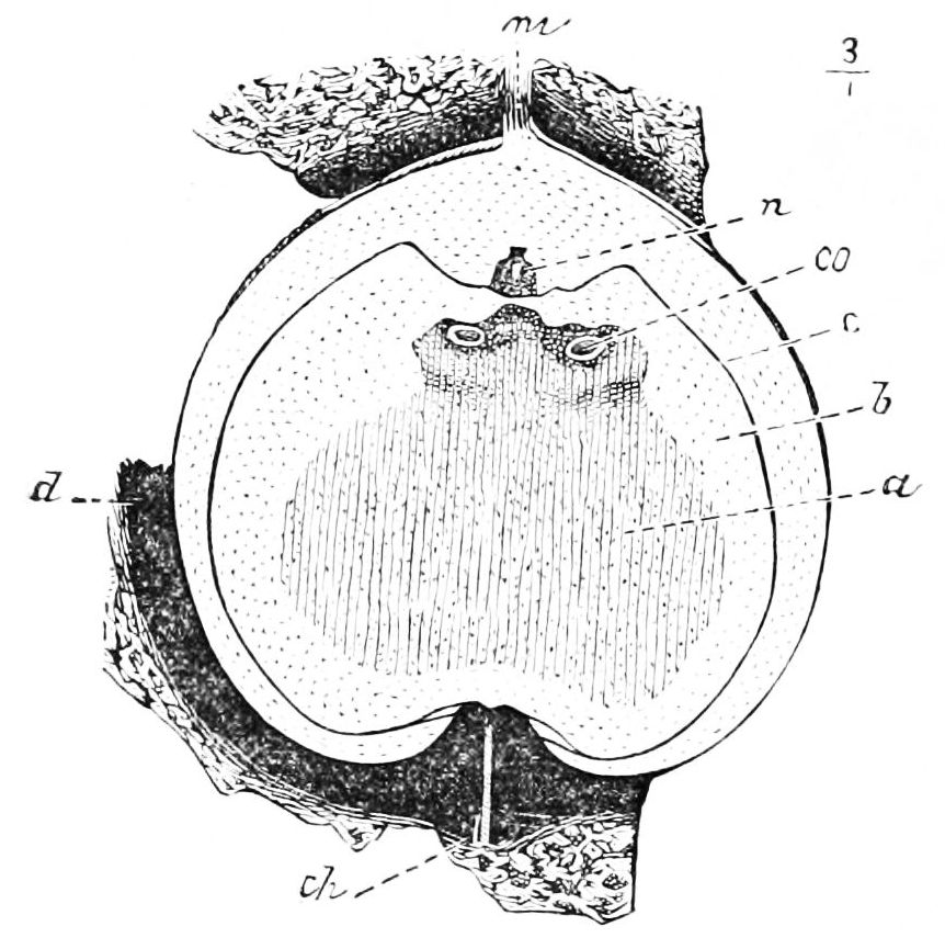 Cardiocarpus sclerotesta